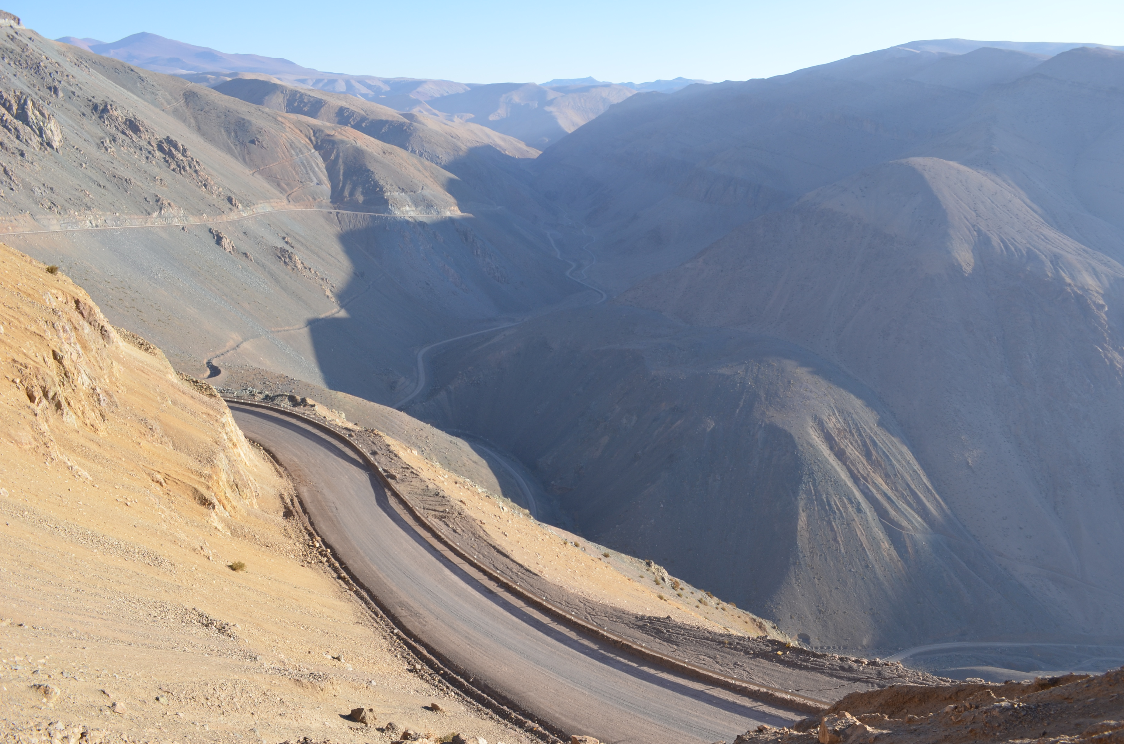 Ruta Patrimonial de Derrotero de Atacama - Cordillera de Domeyko